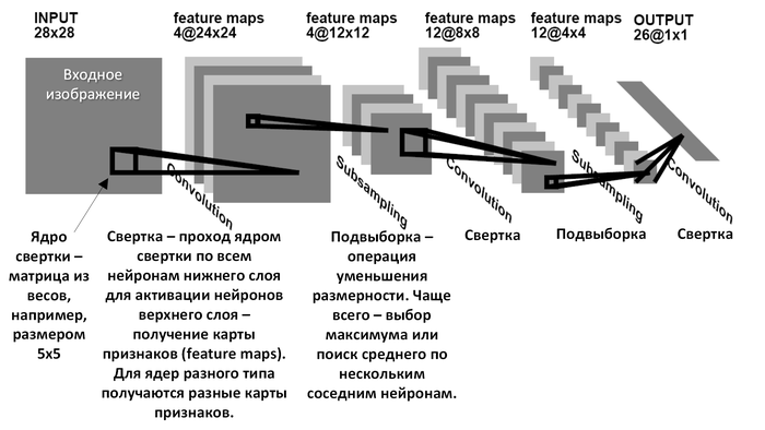 Архитектура сверточной нейронной сети